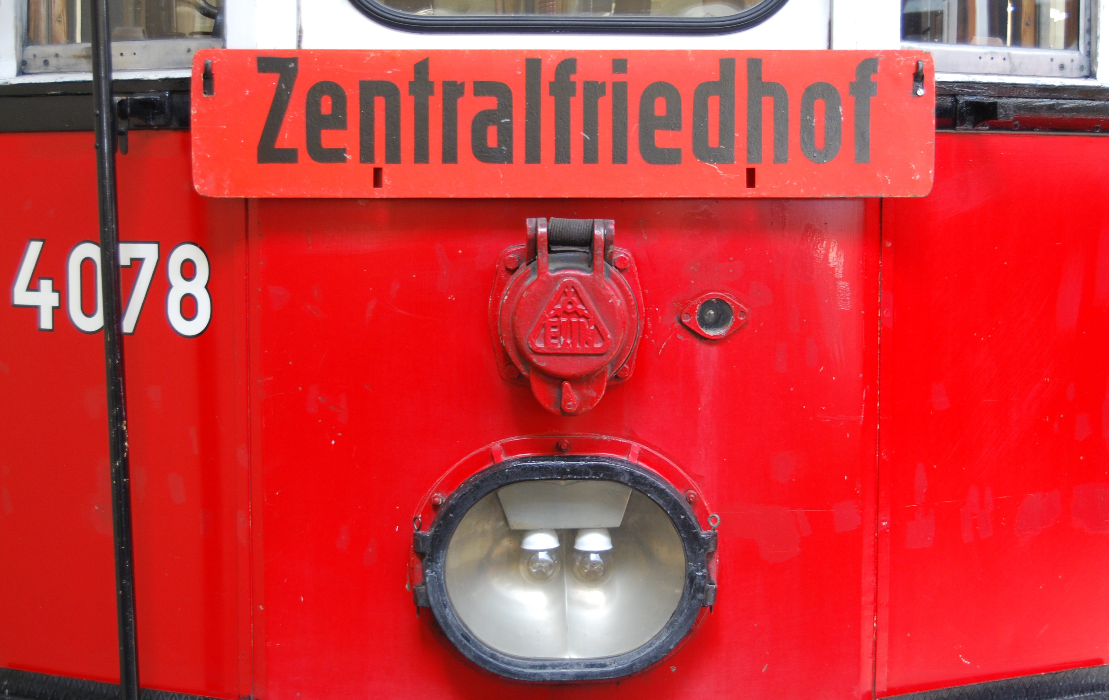 Straßenbahnmuseum